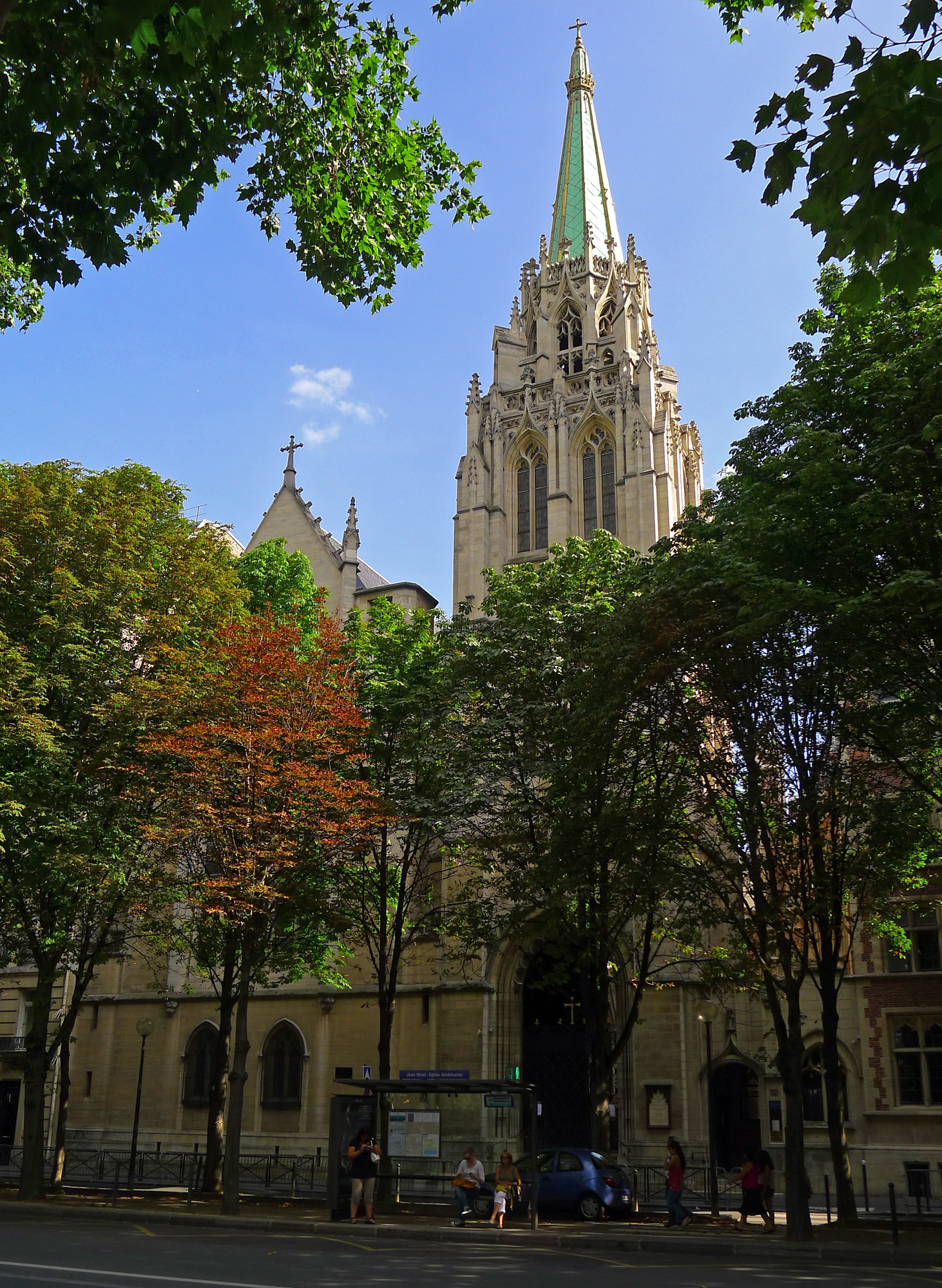 Quai d'Orsay (n°65 église americaine de Paris) - Paris VII